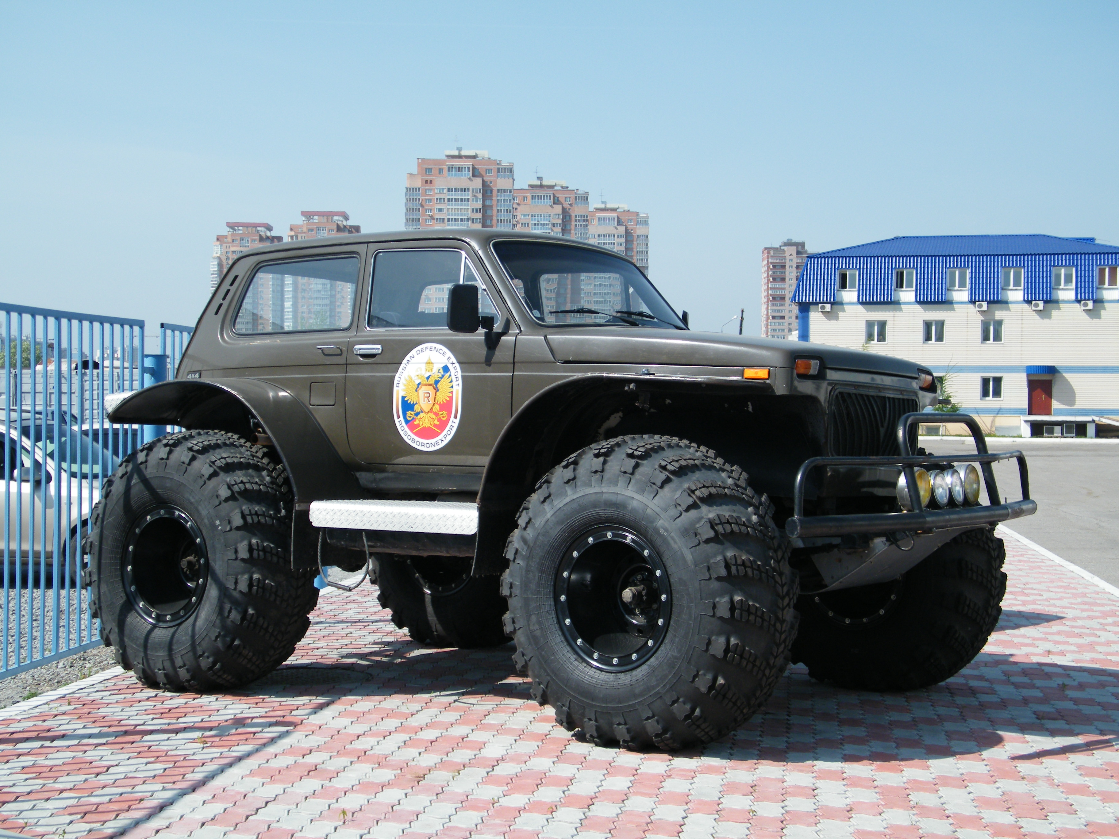 VAZ-1922